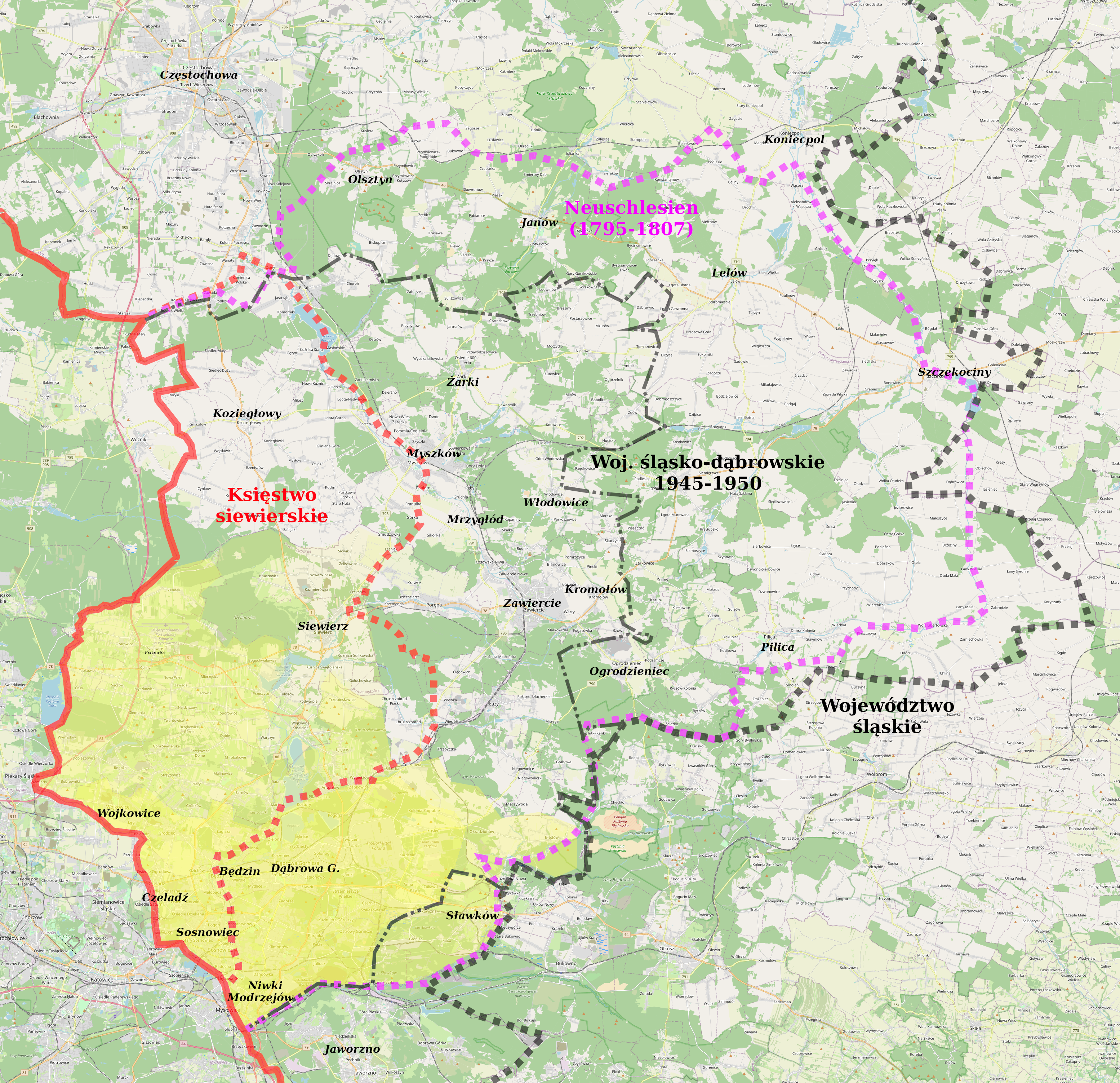 Granice historyczne wokół Zagłębia Dąbrowskiego: nieprzerwana czerwona linia - tradycyjna granica śląsko-małopolska przerywana czerwona linia - granica księstwa siewierskiego na podstawie [1] różowa przerywana linia - granica Nowego Śląska po drugim rozbiorze Polski do 1815 na podstawie [2] czarna przerywana linia - współczesna granica woj. śląskiego mniejsza czarna kropkowano-liniowa linia - granica woj. śląsko-dąbrowskiego (File:Silesian Voivodeship Administrative Map 1946.png) kolor żółty - mniej więcej obszar Zagłębia Dąbrowskiego